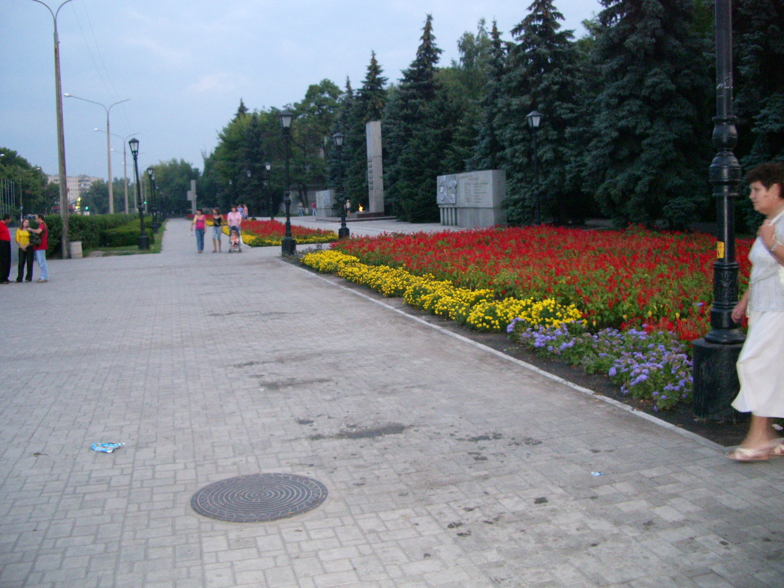 Центральная аллея, г. Павлоград